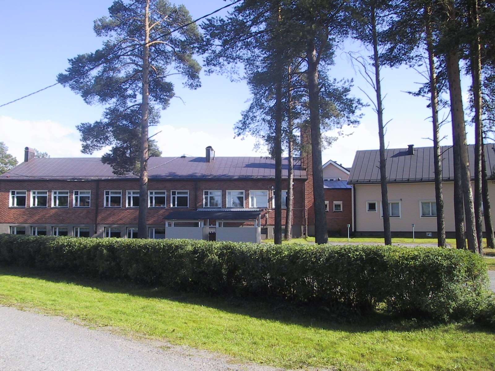 Ylikylän koulu, vanhempi puoli. Kempele.